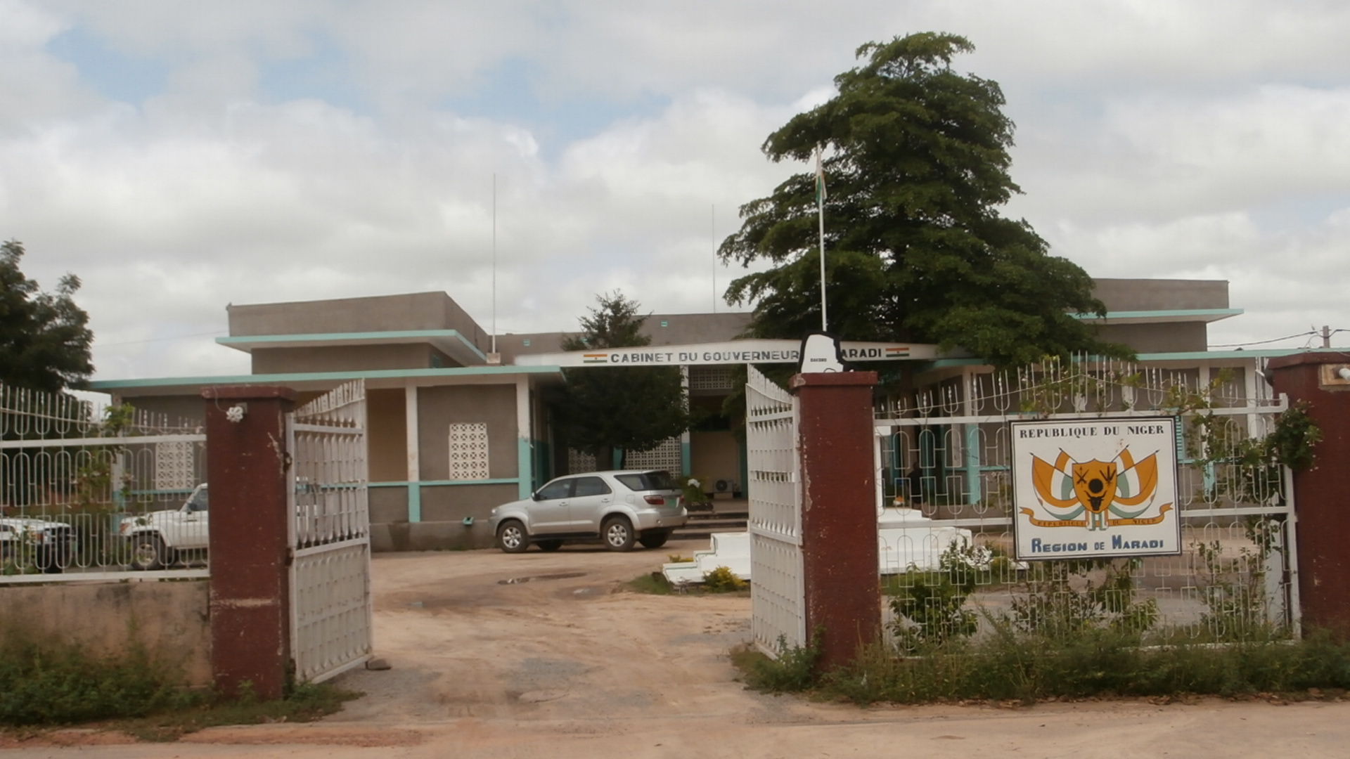 Gouvernaurat de Maradi